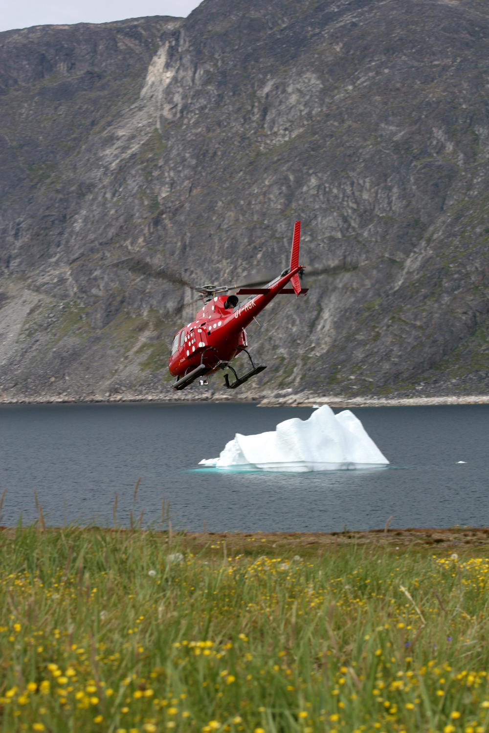 AirGreenland Helicopter